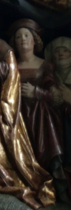 Darstellung von Barbara Mitterhofer, der Ehefrau Florian Waldaufs, unter dem Mantel der Frauensteiner Schutzmantelmadonna